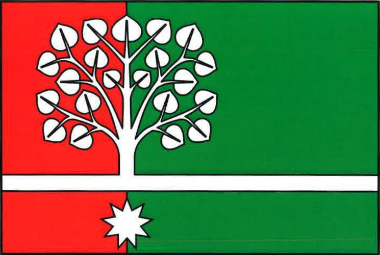 vlajka Lipovec